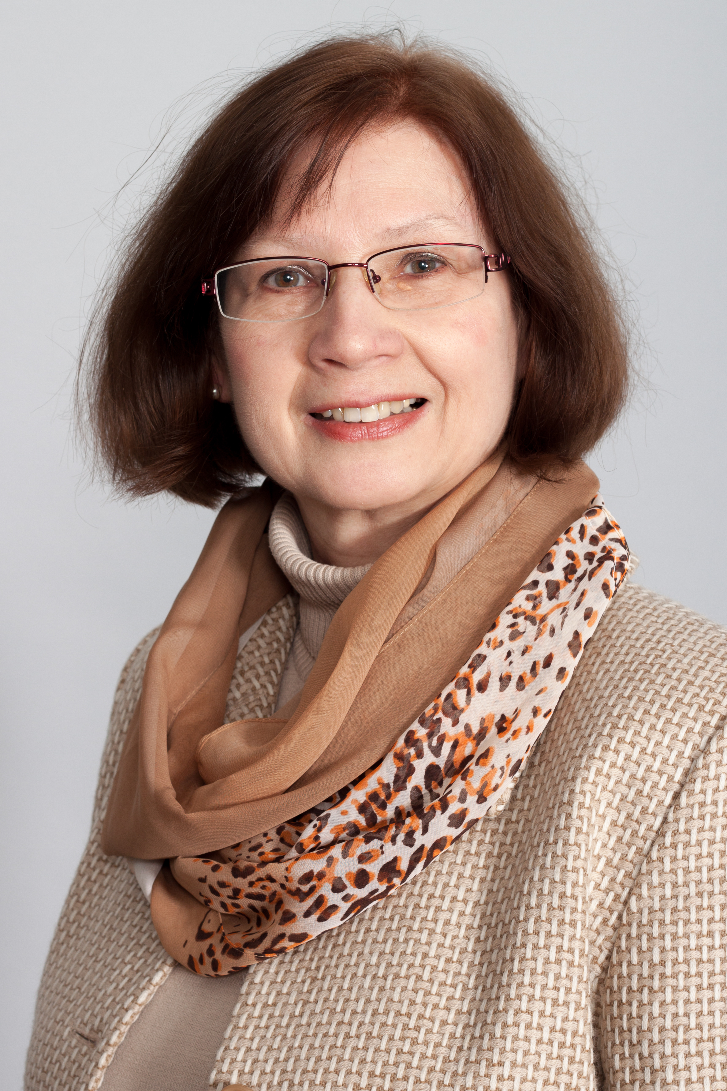 Abgeordnete des Sächsischen Landtages Liane Deicke